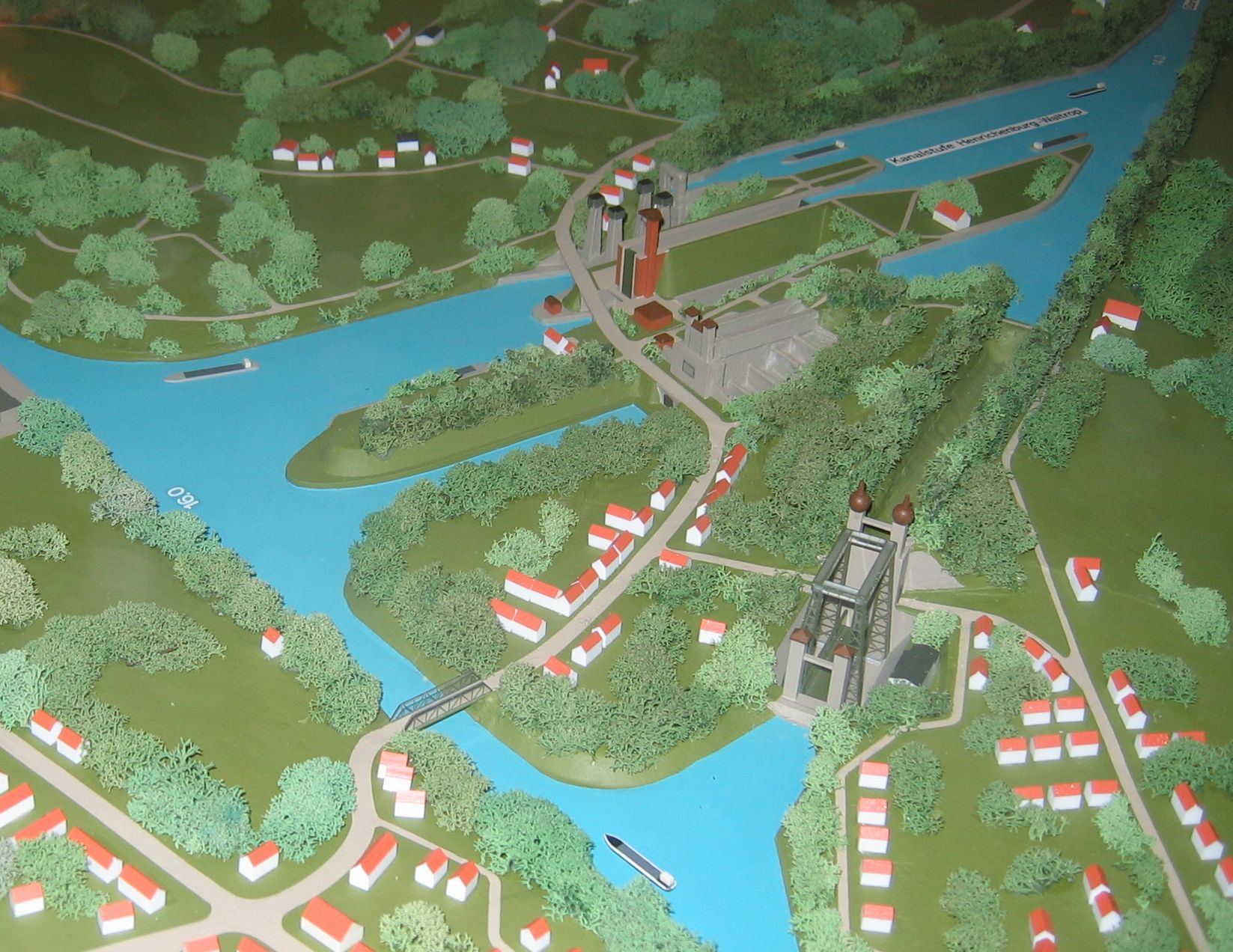 Eigene Fotografie: Modell des Anlage rund um das Schiffshebewerk Henrichenburg, aufgenommen in der dortigen Ausstellung.